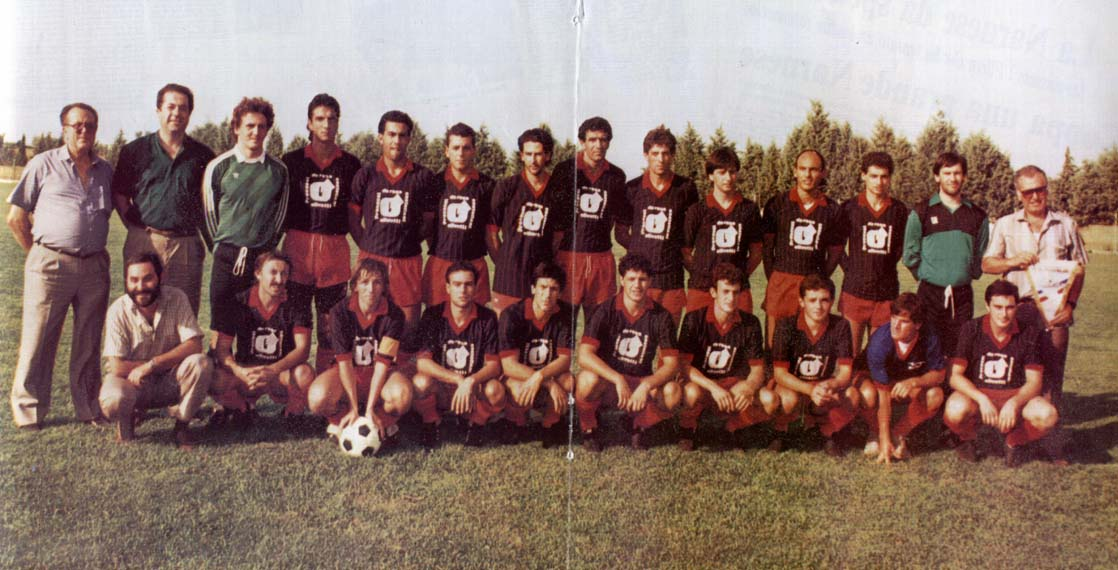 La Narnese vincitrice del campionato di Promozione Umbra 1985-86. Promossa in serie D - In alto da sin.: Romani (Pres.), De Rosa (Pres.), Valloni, Cinelli, Testa, Proietti, Carletti, Conocchia, Novelli, Petrongari, Scarfì, Dominici, Carnevali, Nini (Dir.). In basso da sin.: Di Pietro (Segr.), Moretti, Luciani, Antonelli, Pieri, Campioni, Peresso, Passone, Morelli, Bandini.